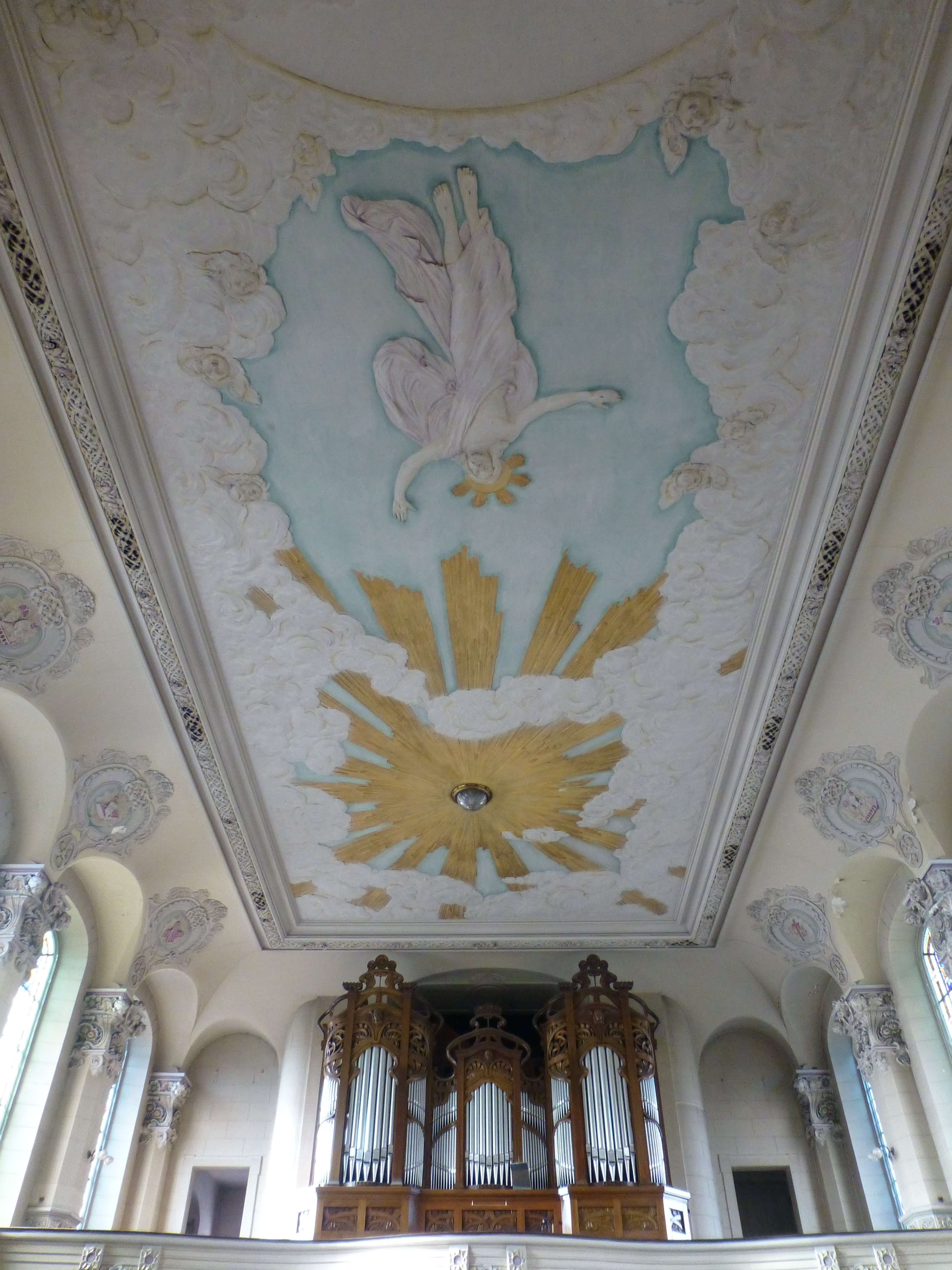 Salvatorkirche Gera, Stuckdecke und Orgelempore mit der Röver-Orgel (1903-1904)